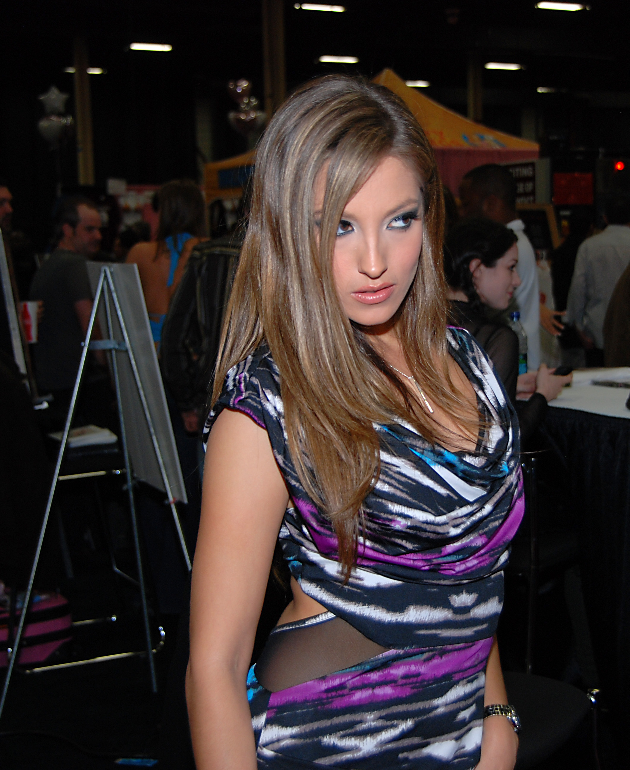 DSC_1015A